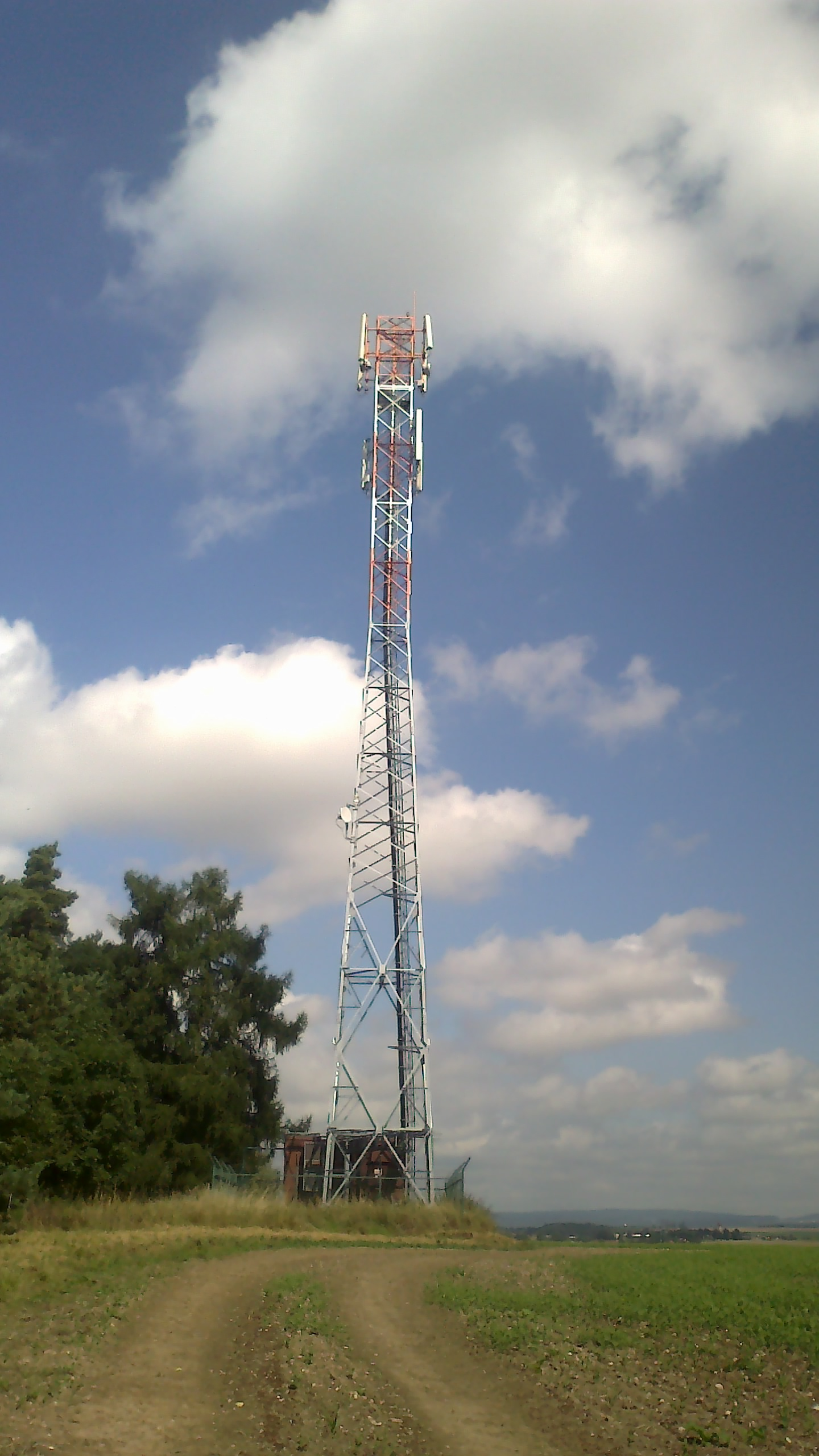 Vysílač mobilního signálu O2